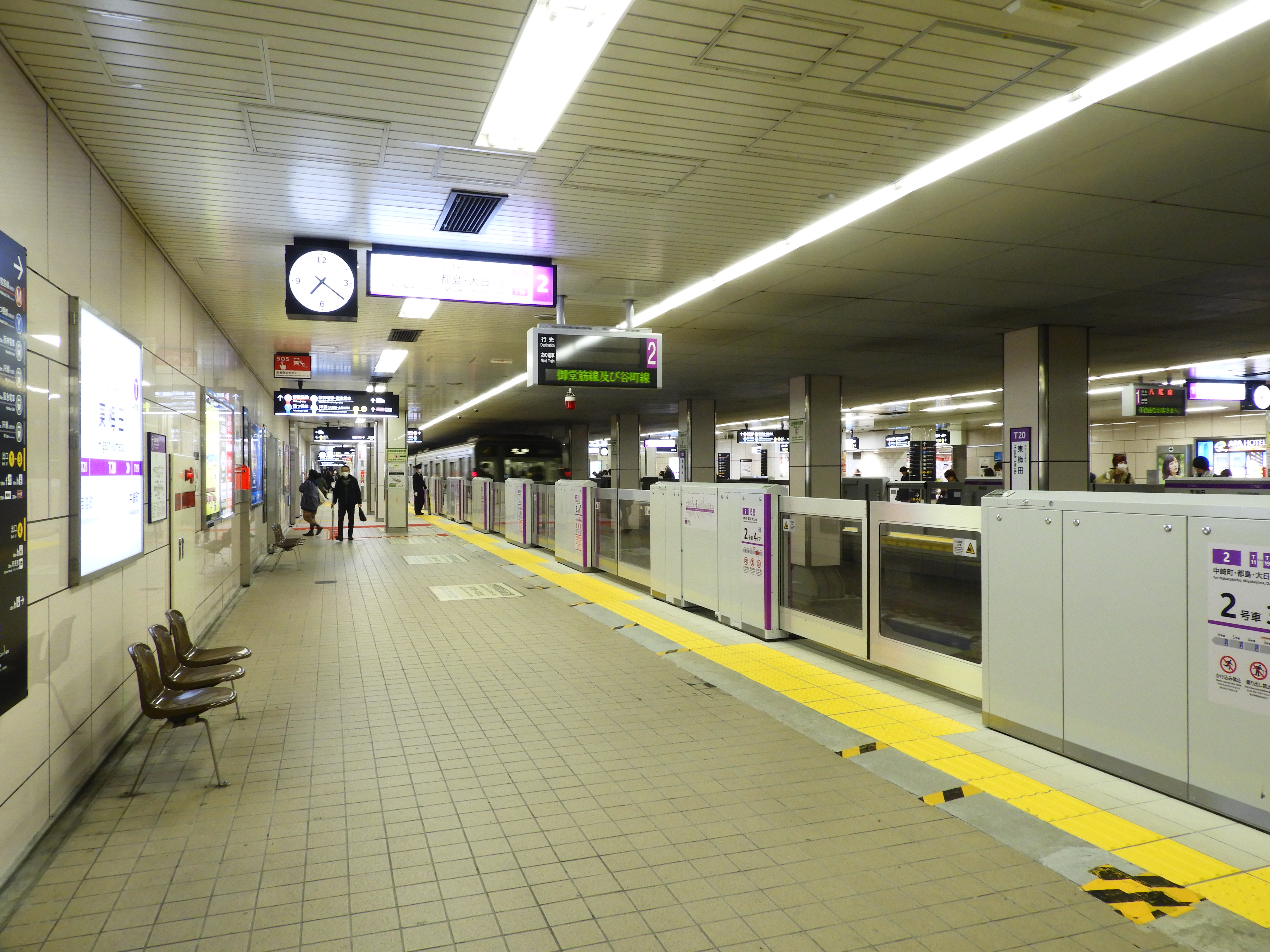 Osaka Metro谷町線東梅田駅2番線(ホームドア設置後)